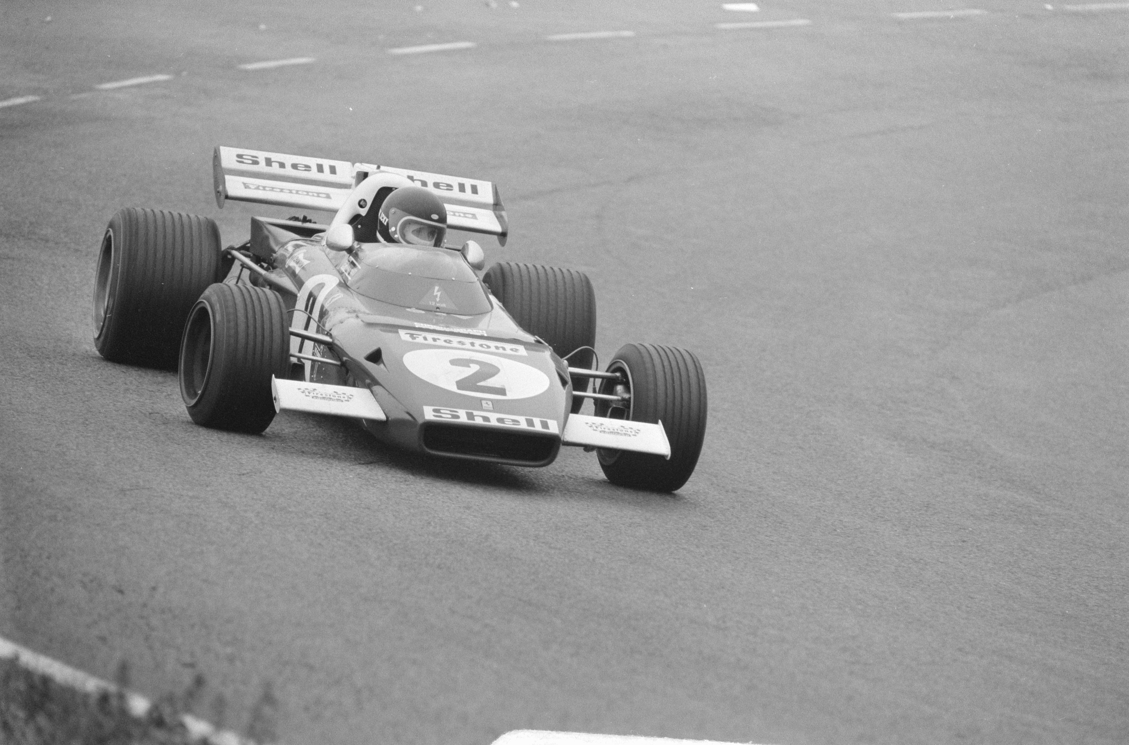 Collectie / Archief : Fotocollectie Anefo Reportage / Serie : Grote Prijs van Nederland Formule I wagen, Zandvoort Beschrijving : Jacky Ickx Datum : 20 juni 1971 Locatie : Noord-Holland, Zandvoort Trefwoorden : autosport, circuits, raceauto's, races, wedstrijden Persoonsnaam : Ickx, Jacky Fotograaf : Fotograaf Onbekend / Anefo, [onbekend] Auteursrechthebbende : Nationaal Archief Materiaalsoort : Negatief (zwart/wit) Nummer archiefinventaris : bekijk toegang 2.24.01.05 Bestanddeelnummer : 924-6670